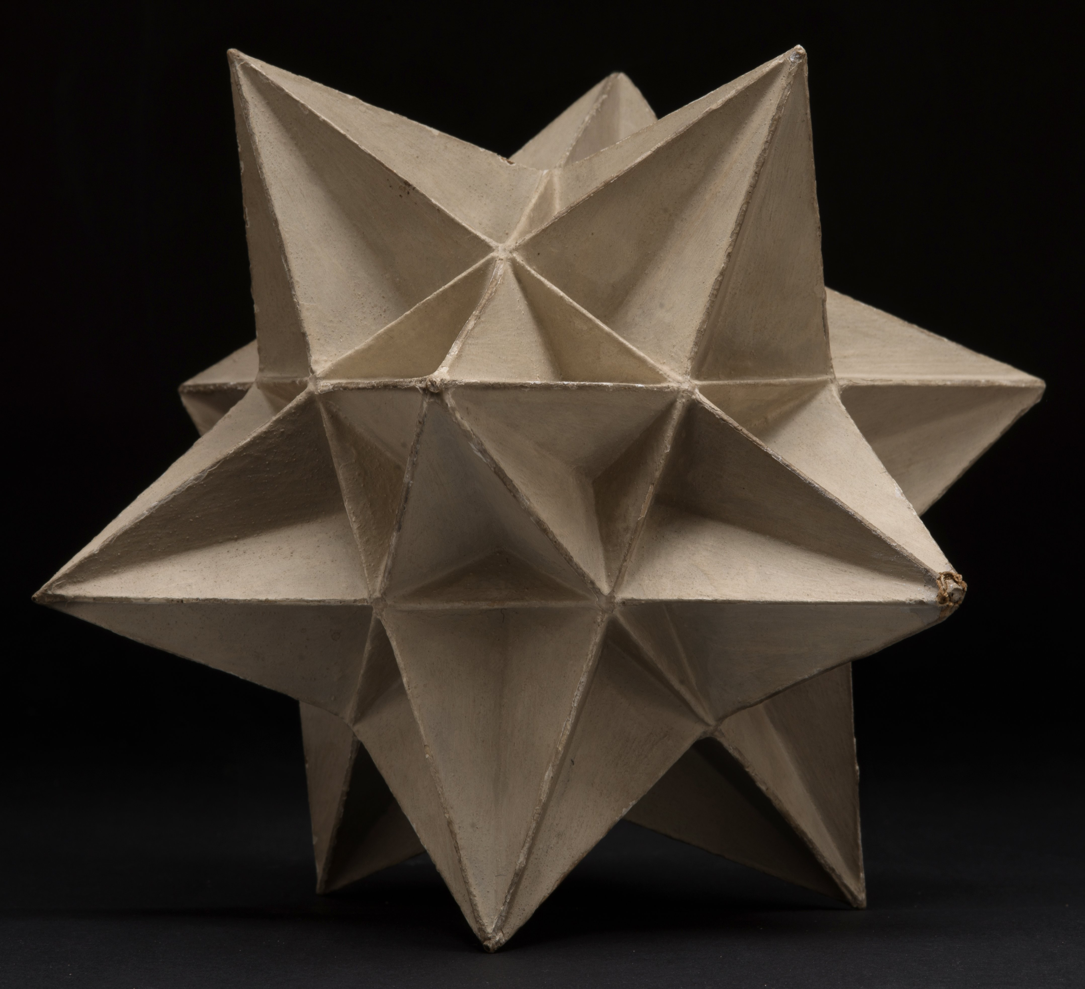 Pappmodell eines großen Ikosaeders Objekt MNF-Ma-AA16, Mathematische Sammlung der Universität Tübingen Hergestellt von Max Doll um 1860